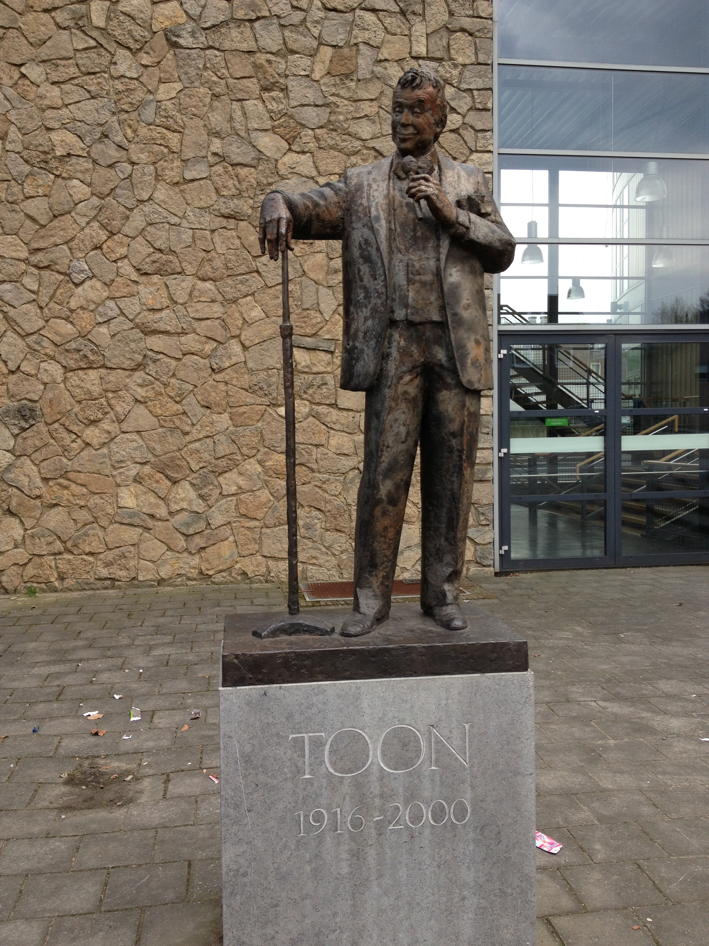 Standbeeld van Toon Hermans voor de schouwburg van Sittard